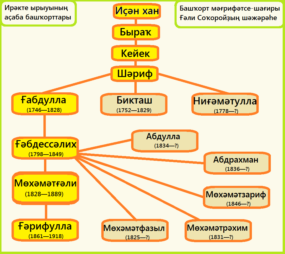 Родословная башкирского поэта-просветителя Г. Сокороя (1828—1889) Башҡортса: Башҡорт мәғрифәтсе-шағиры Ғ. Соҡоройҙың (1828—1889) шәжәрәһе